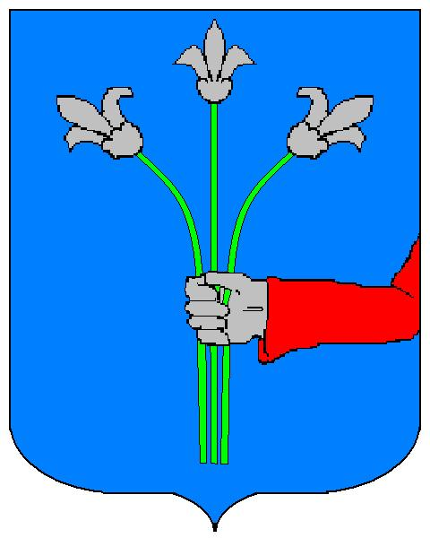 Grb obitelji Iveljić